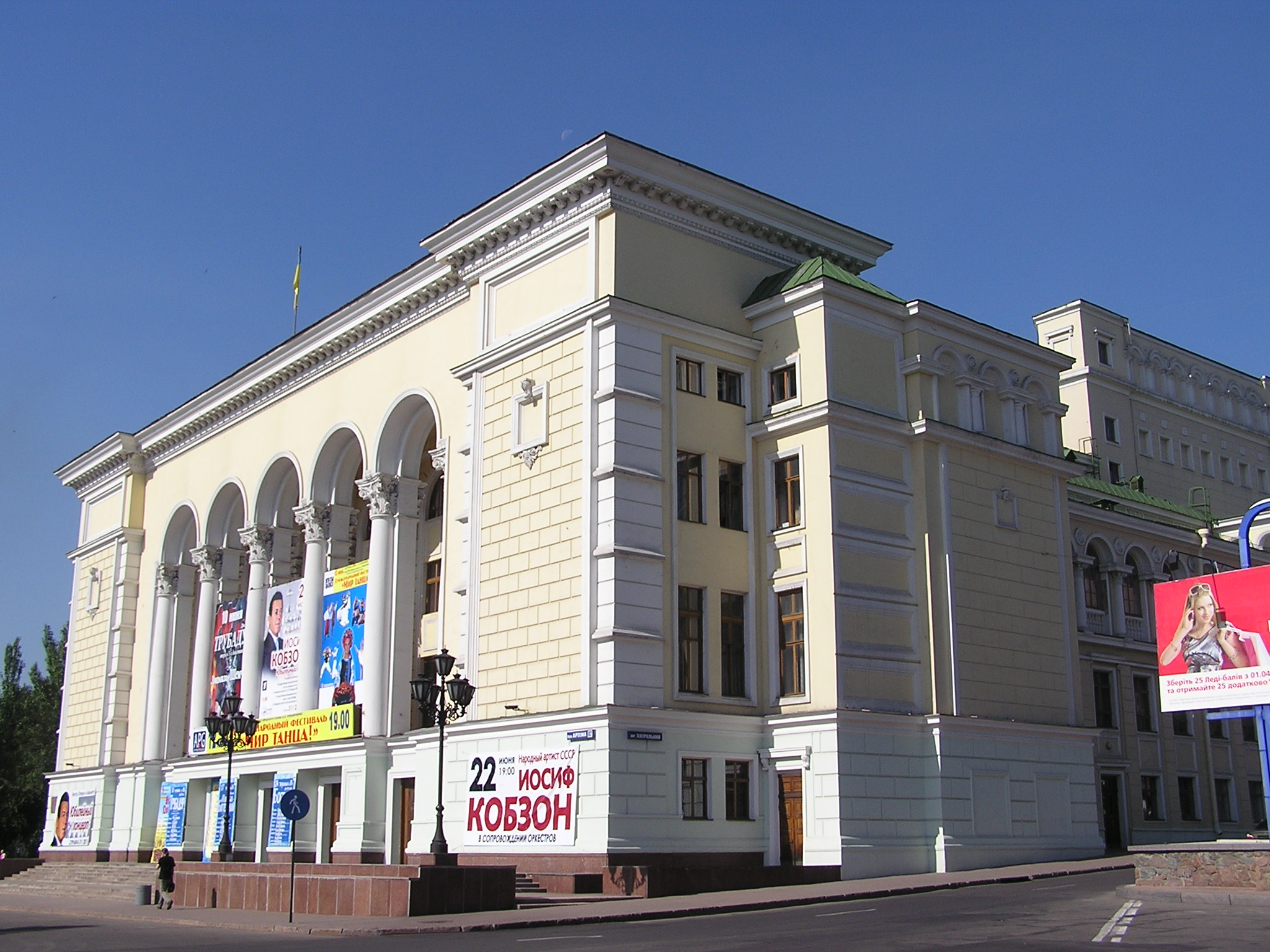 Донецкий академический государственный театр оперы и балета им. А.Б.Соловьяненко